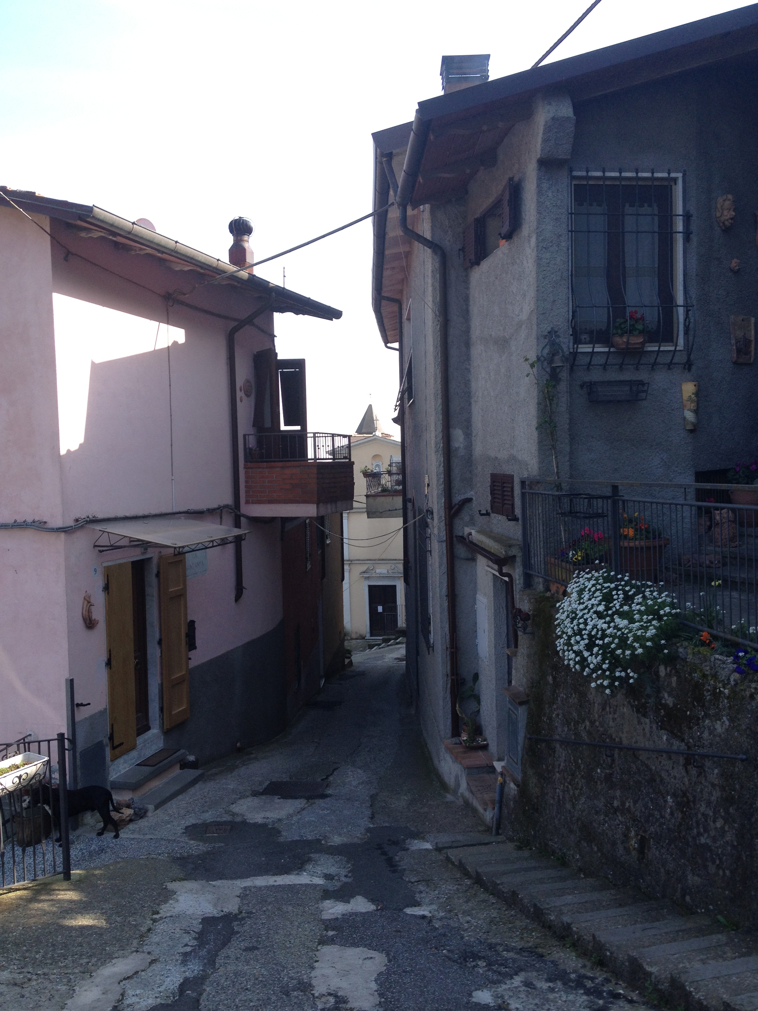 panorama view mountain